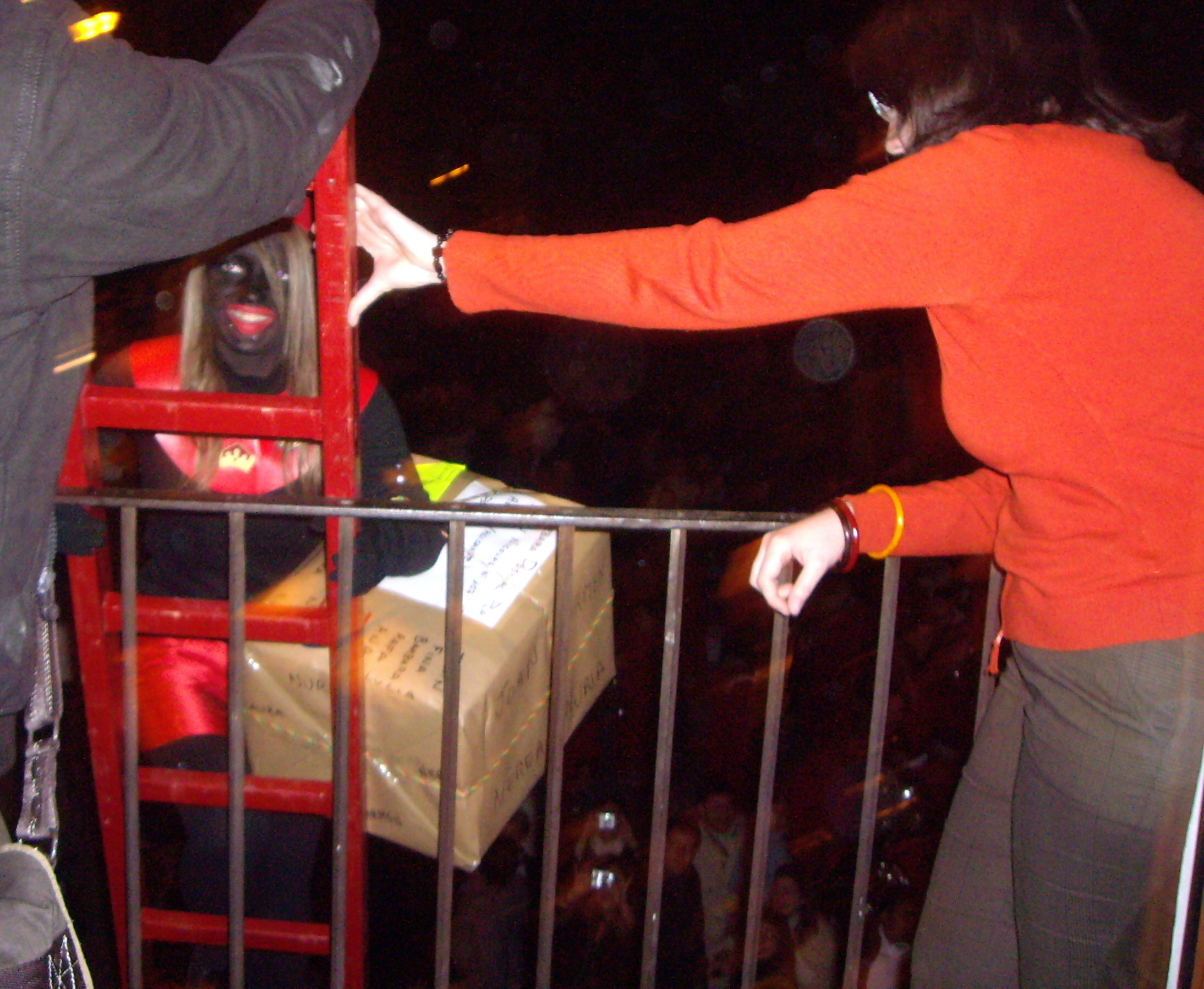 Cavalcada de Reis. Alcoi